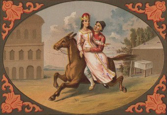 Конек горбунок. Москва. Хромолитография А.А. Абрамова. 1885 г.